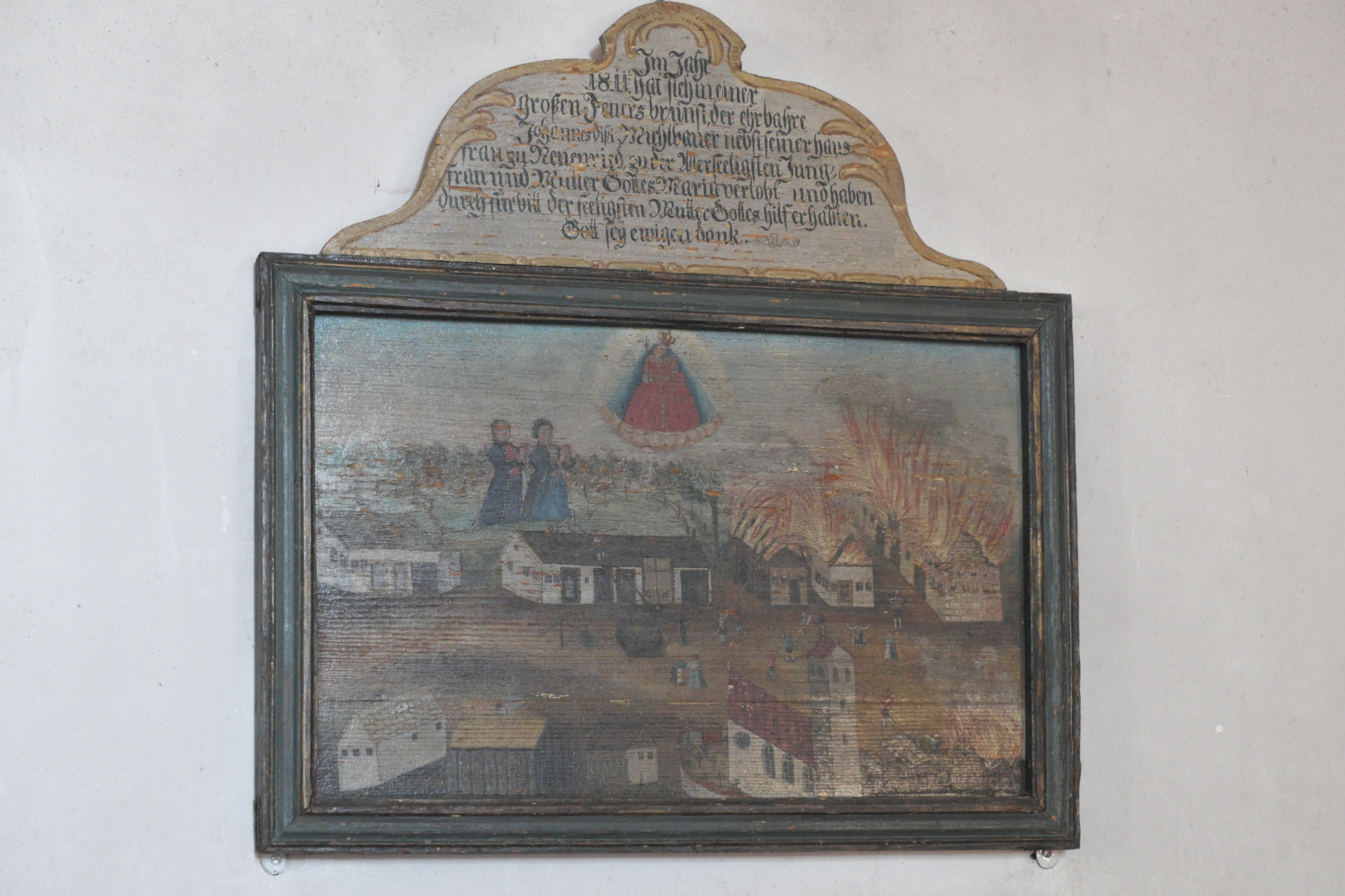 Alte katholische Pfarrkirche St. Nikolaus in Neuried (bei München) im Landkreis München (Bayern, Deutschland), Votivtafel von 1811